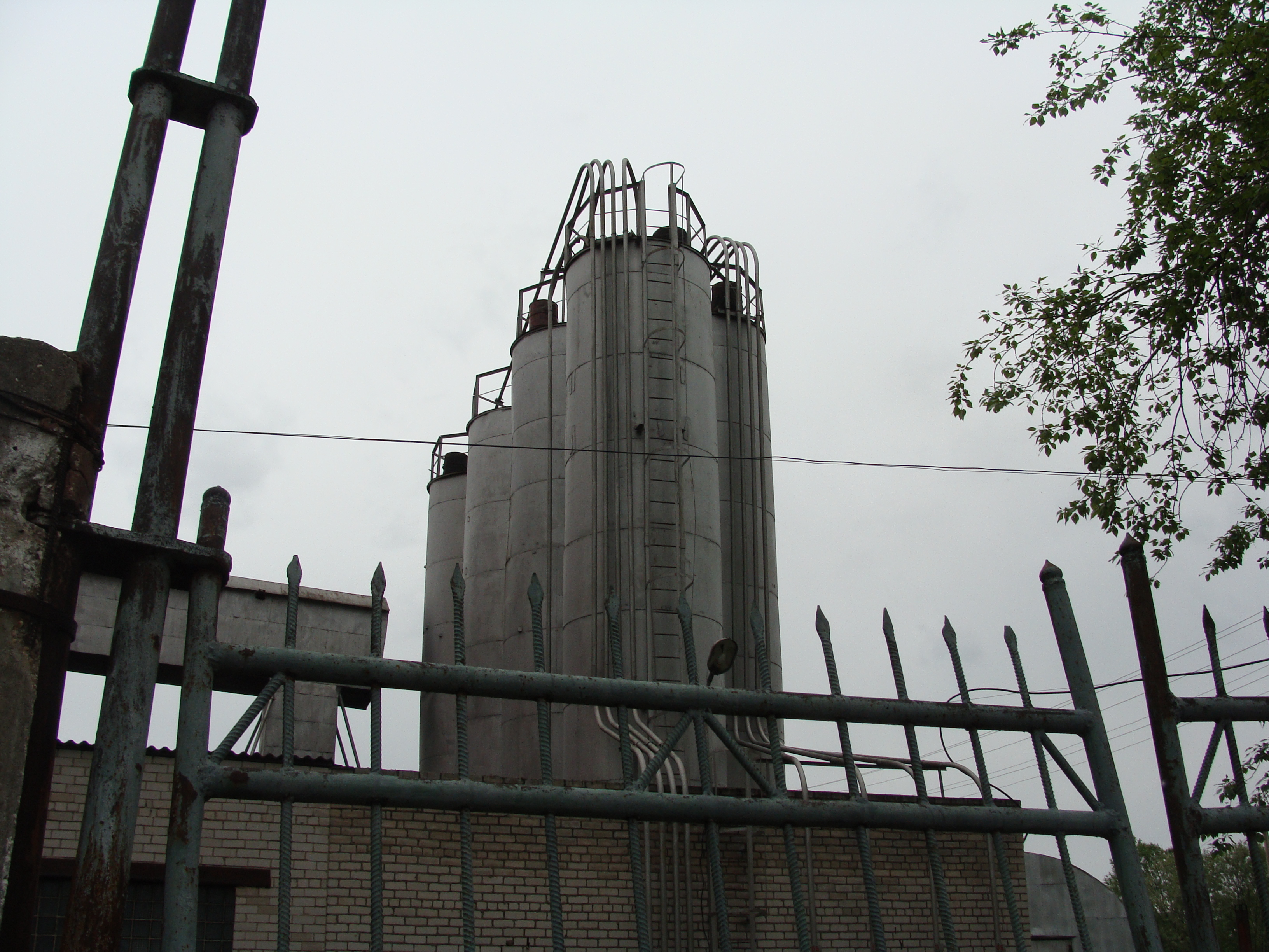 Котласский хлебокомбинат